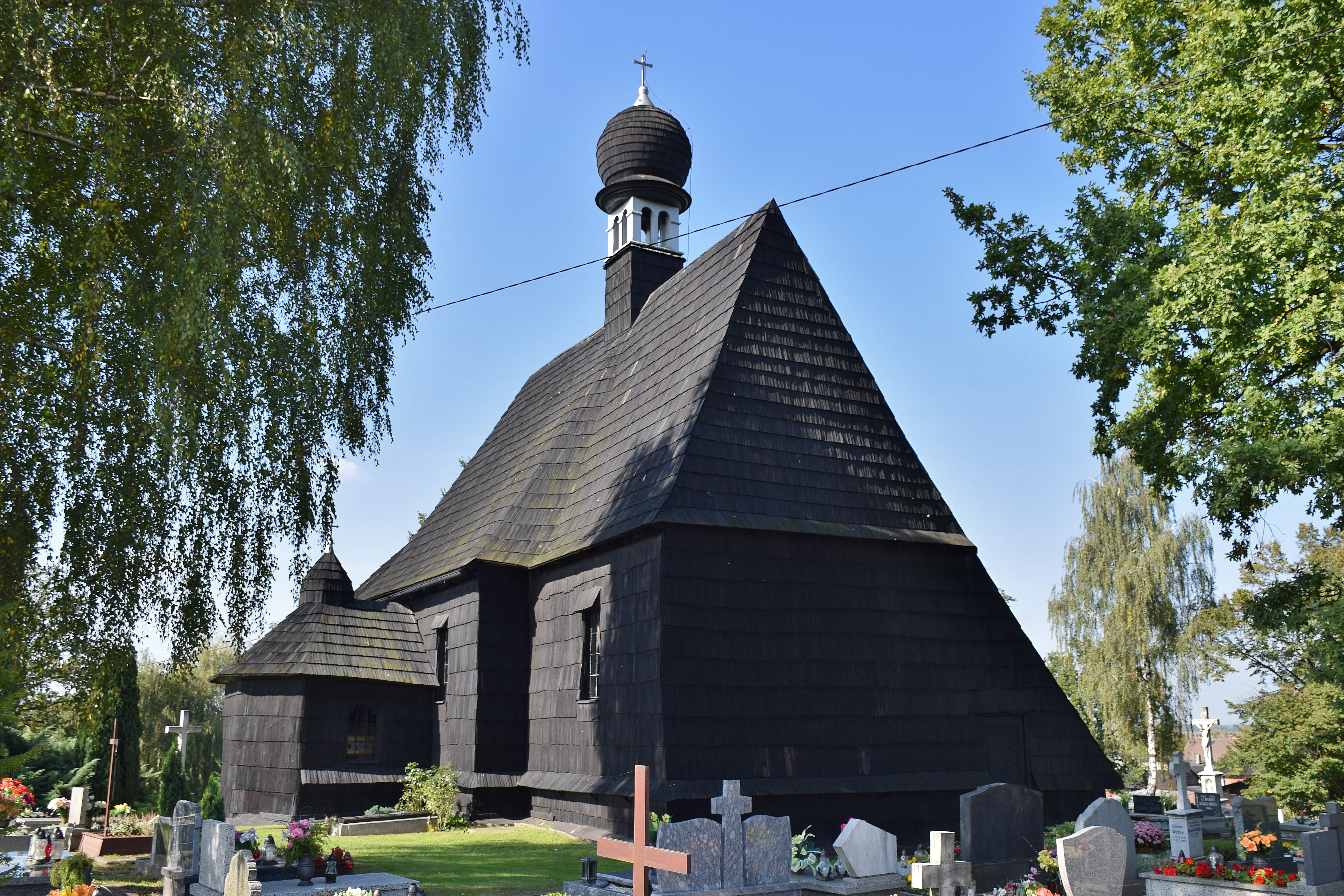 Księży Las, kościół filialny pw. św. Michała, 1494, 1905